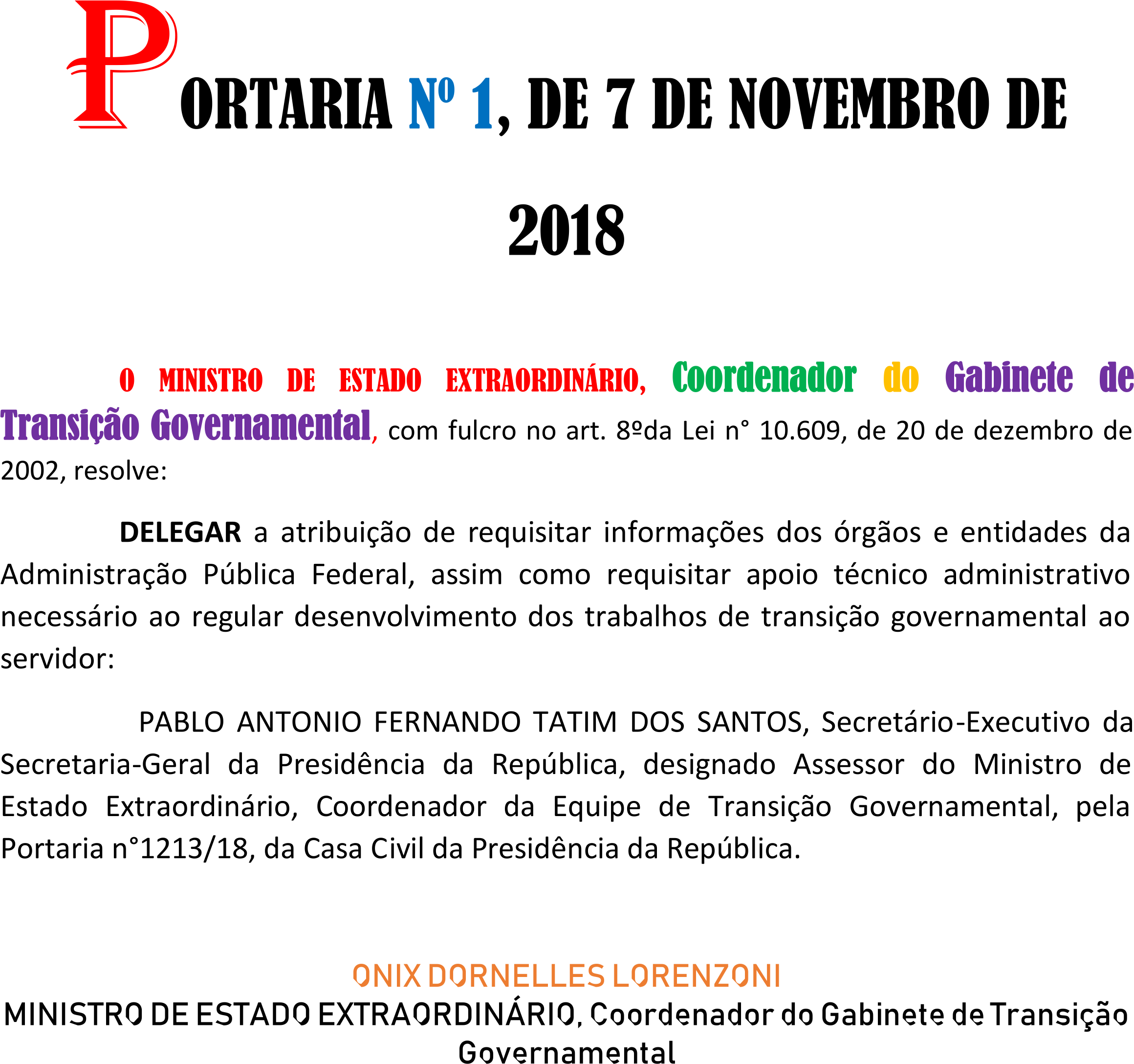 Portaria número 1 do Ministro de Estado Extraordinário, Coordenador do Gabinete de Transição Governamental, Onyx Lorenzoni.